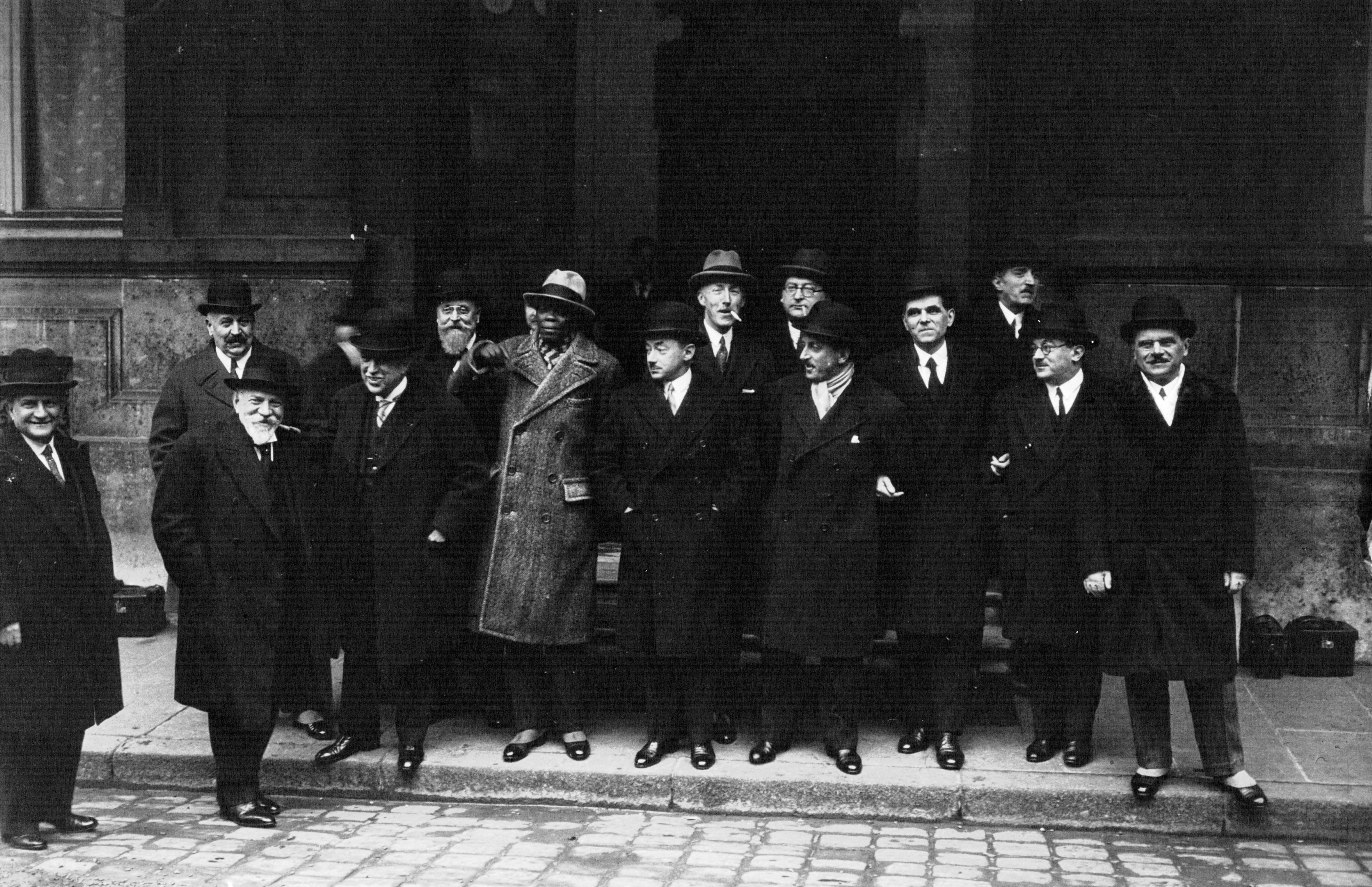 "Un groupe de ministres démissionnaires quittant le ministère de l'Intérieur : 1er Charles Dumont (ministre de l'Intérieur), 2e Diagne (sous-secrétaire d'Etat aux Colonies), 3e Paul Raynaud (ministre des Colonies), 4e Landry (ministre du Travail)" : photographie de presse